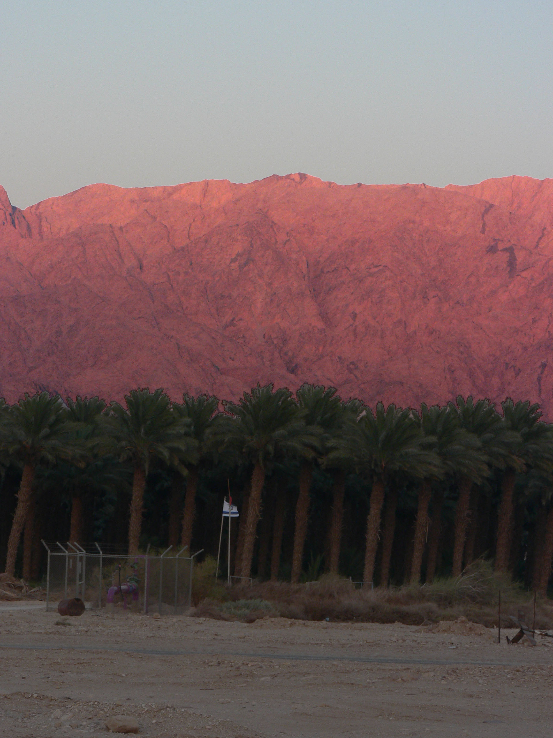 HaArava, Israel הערבה, ישראל